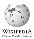 Wikipedia logo 2.0 (zh-min-nan)